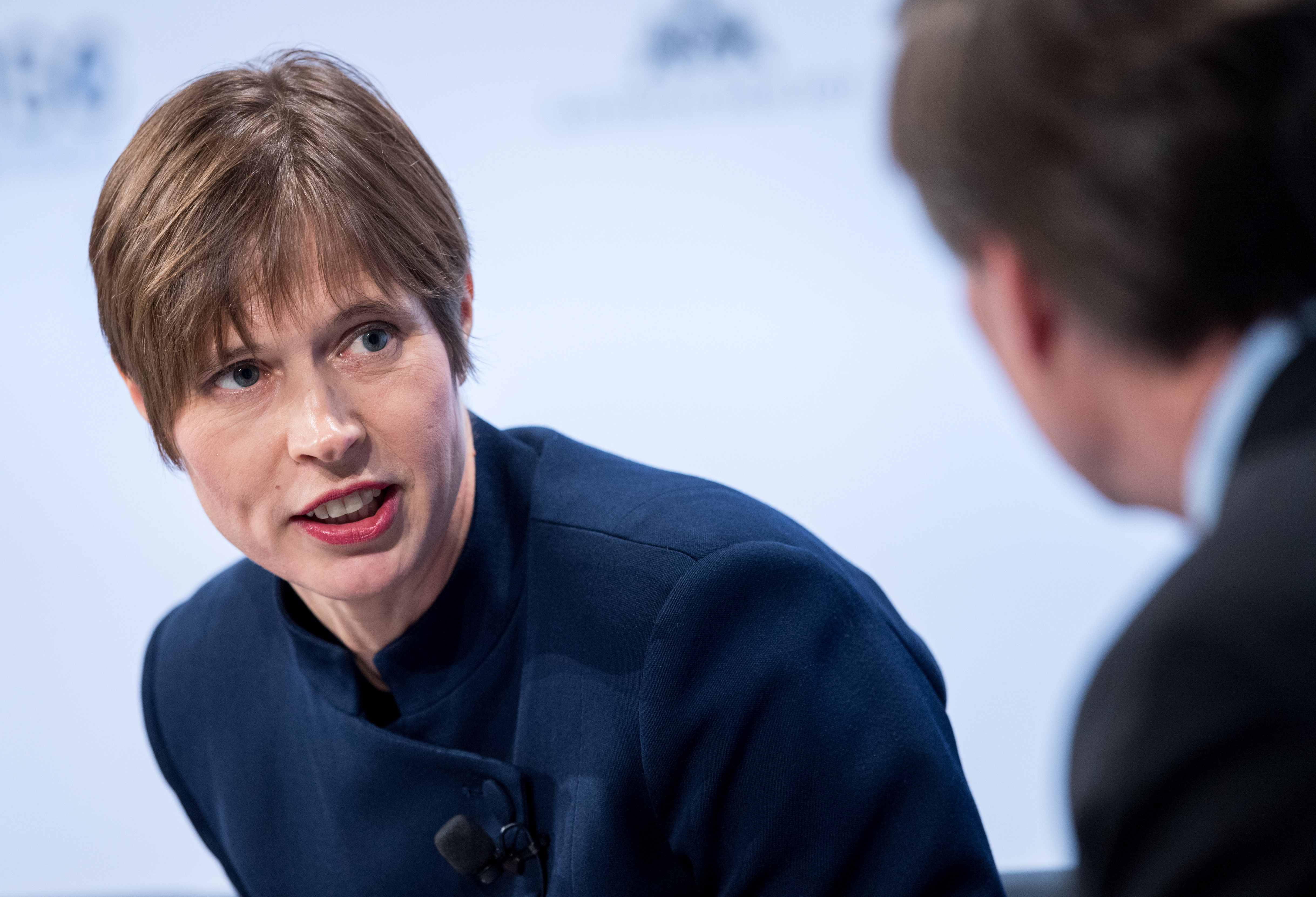 Kersti Kaljulaid während der Münchener Sicherheitskonferenz 2018